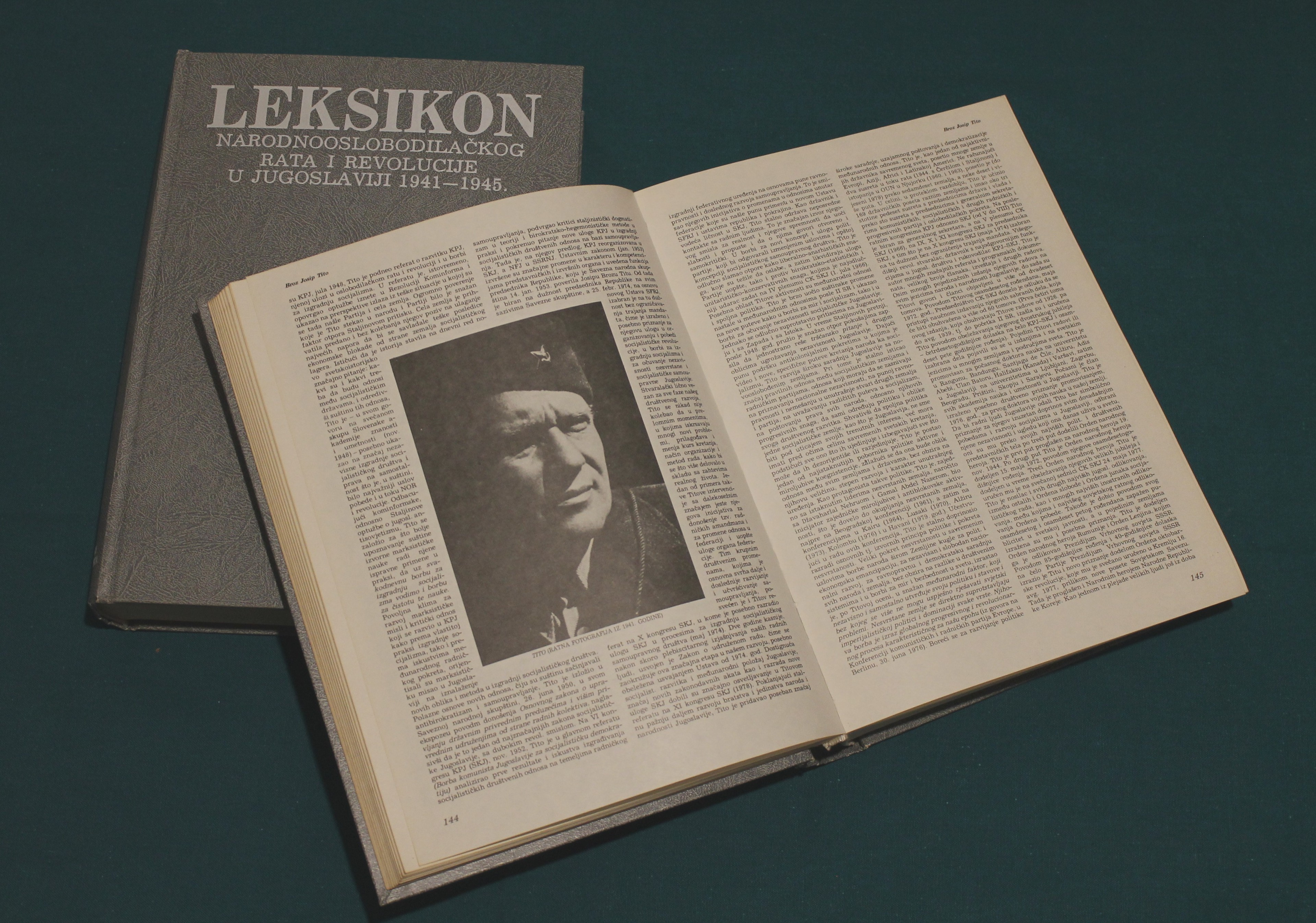 Knjiga Leksikon Narodnooslobodilačkog rata prvi i drugi tom